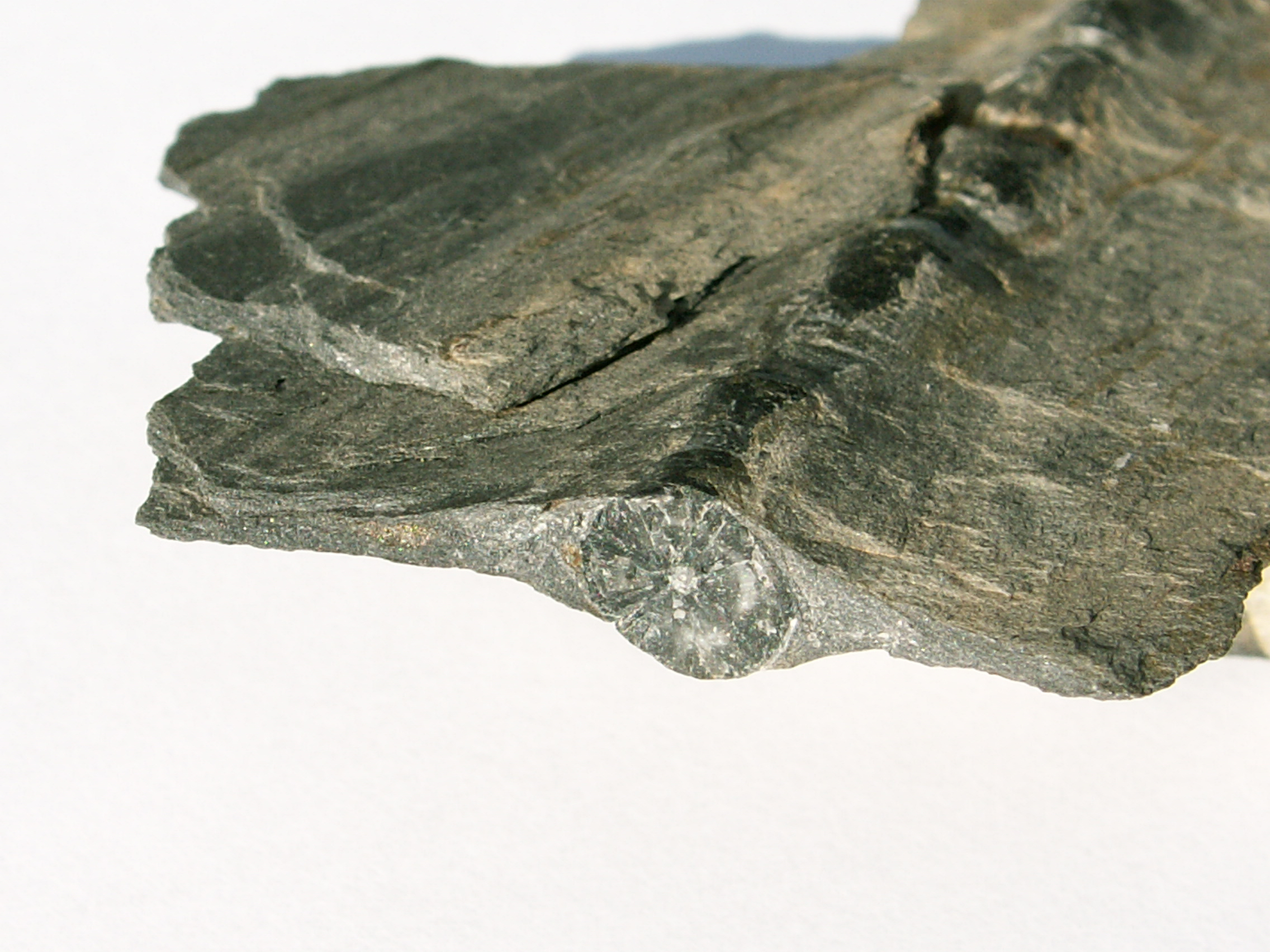 Détail de la section d'un rostre de bélemnite tronçonné par une déformation, dans un schiste. Les espaces sont remplis de calcite. Âge : Lias synrift. Alpes